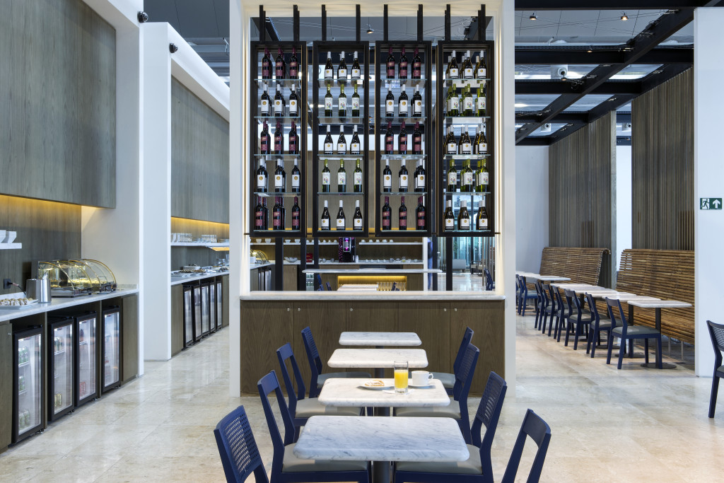 Salon VIP Aeropuerto Guarulhos, Sao Paulo, BR.